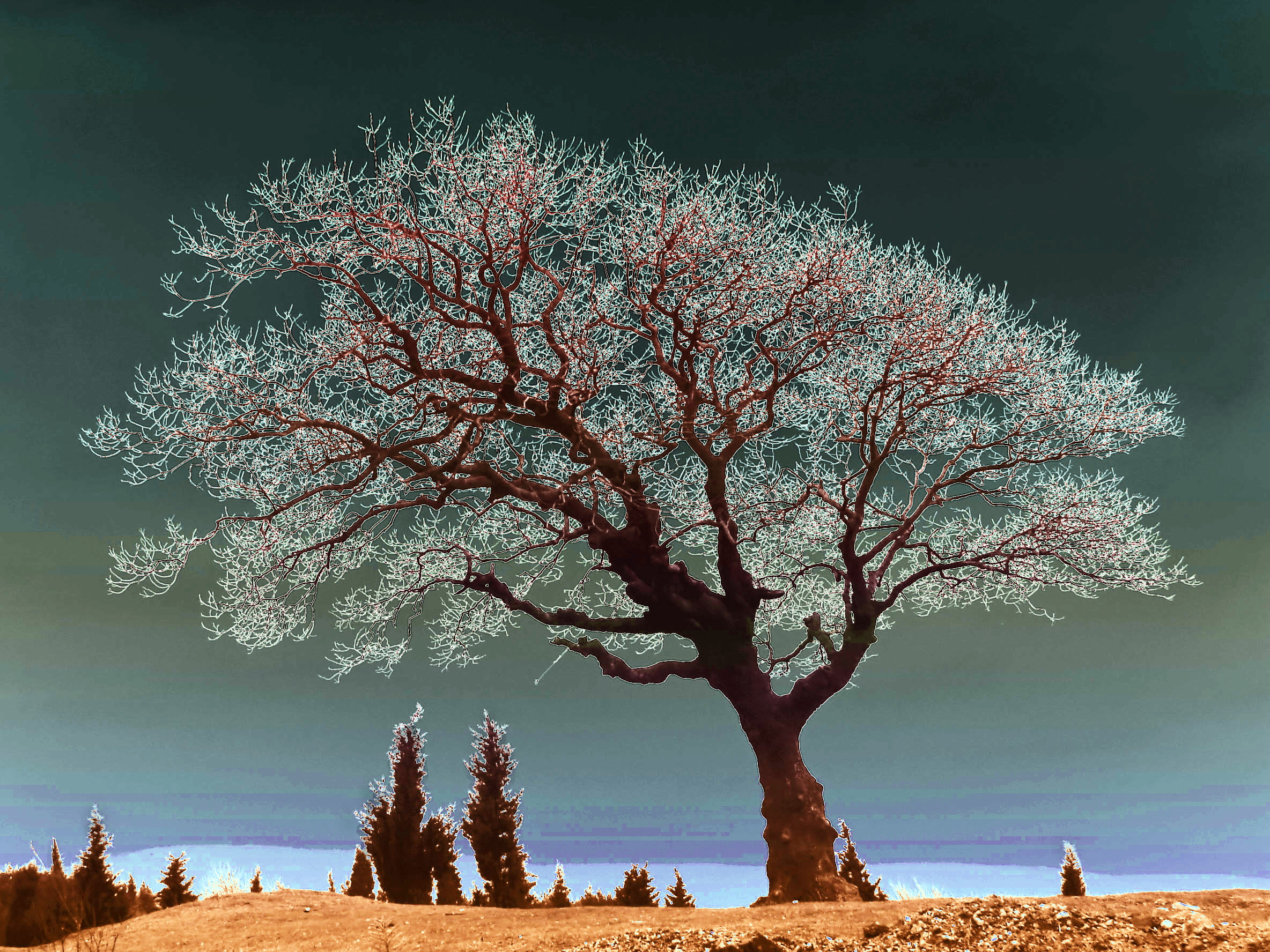 Spiritual Tree, Solarisation